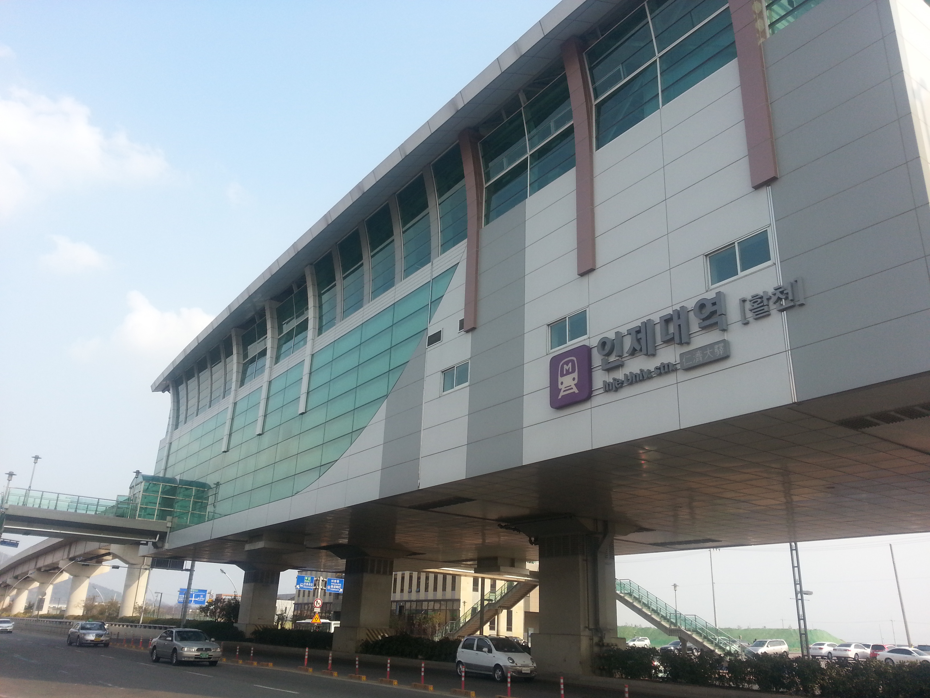 仁済大駅外景。